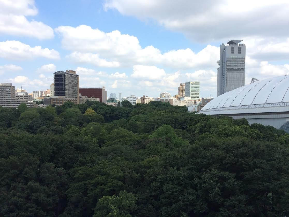 コートレジデントタワー北側住居からの景観